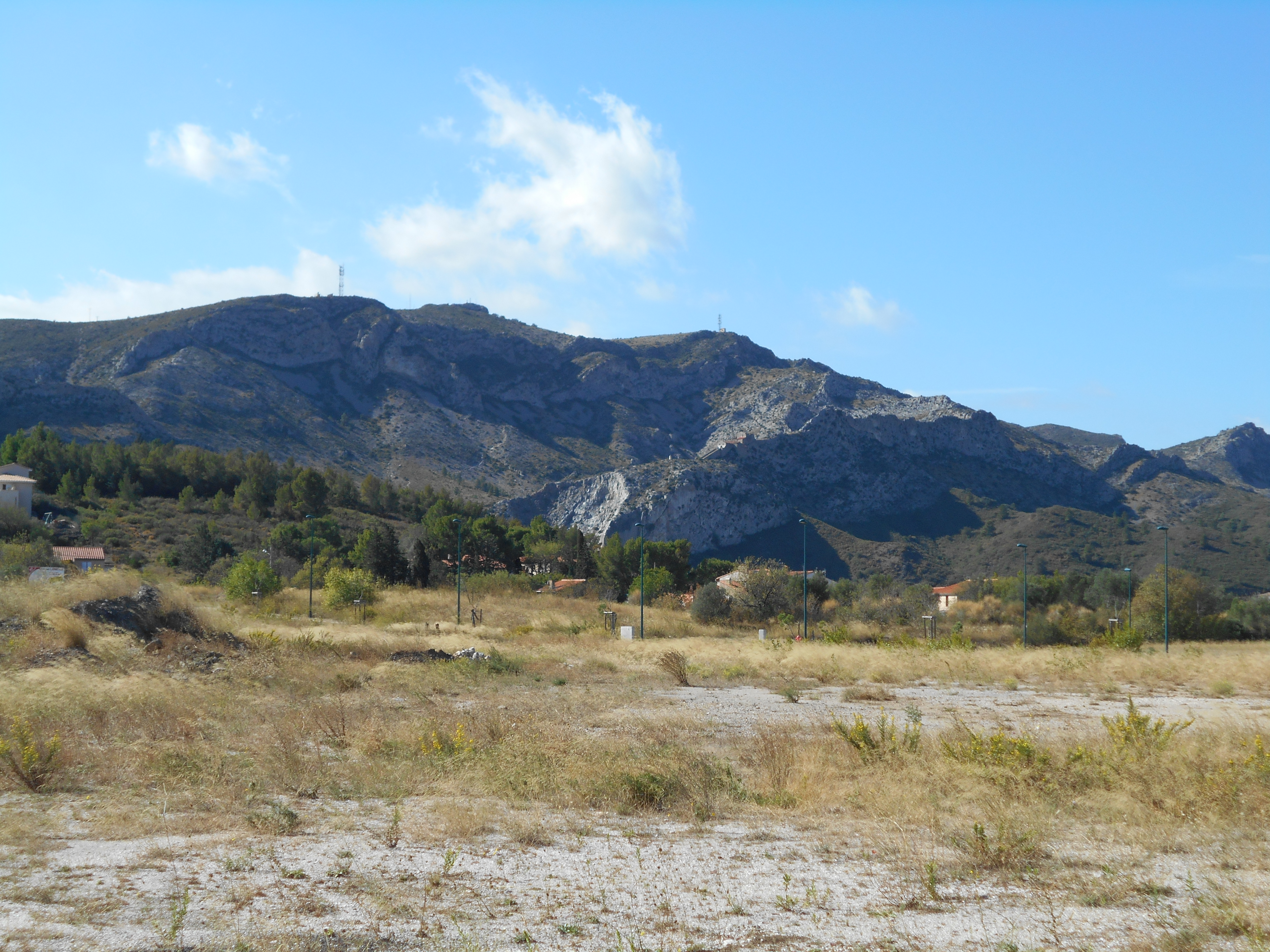 La Serra de Pena, entre Cases de Peena i Baixàs